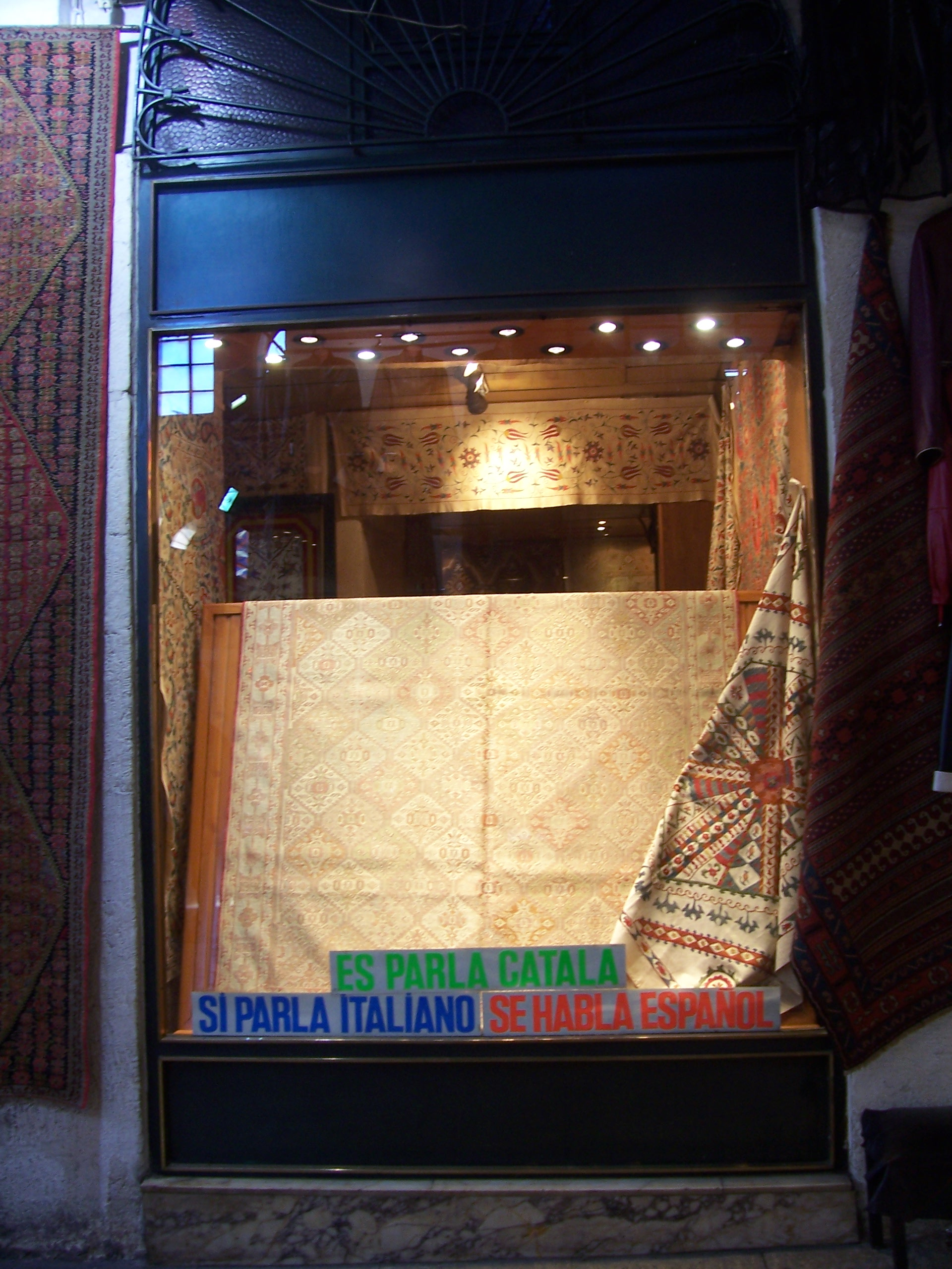 Devanture d'un magasin de tapis à Istambul (bazar) avec cette pancarte : "Es parla catala".